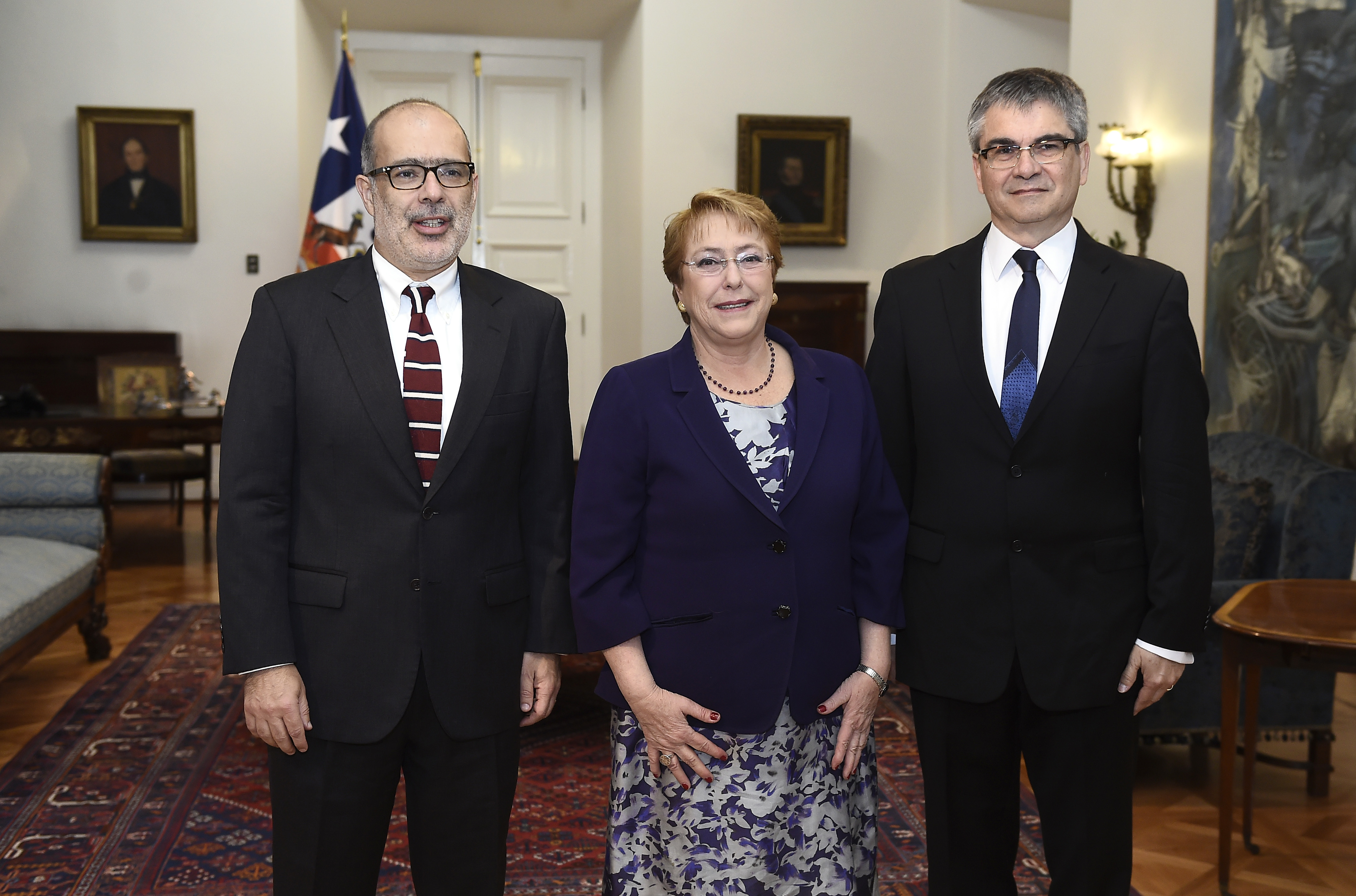 La Presidenta de la República, Michelle Bachelet, acompañada por el ministro de Hacienda, Rodrigo Valdés, anunció al nuevo presidente del Banco Central, el economista Mario Marcel, quien asumió sus funciones el 10 de diciembre.